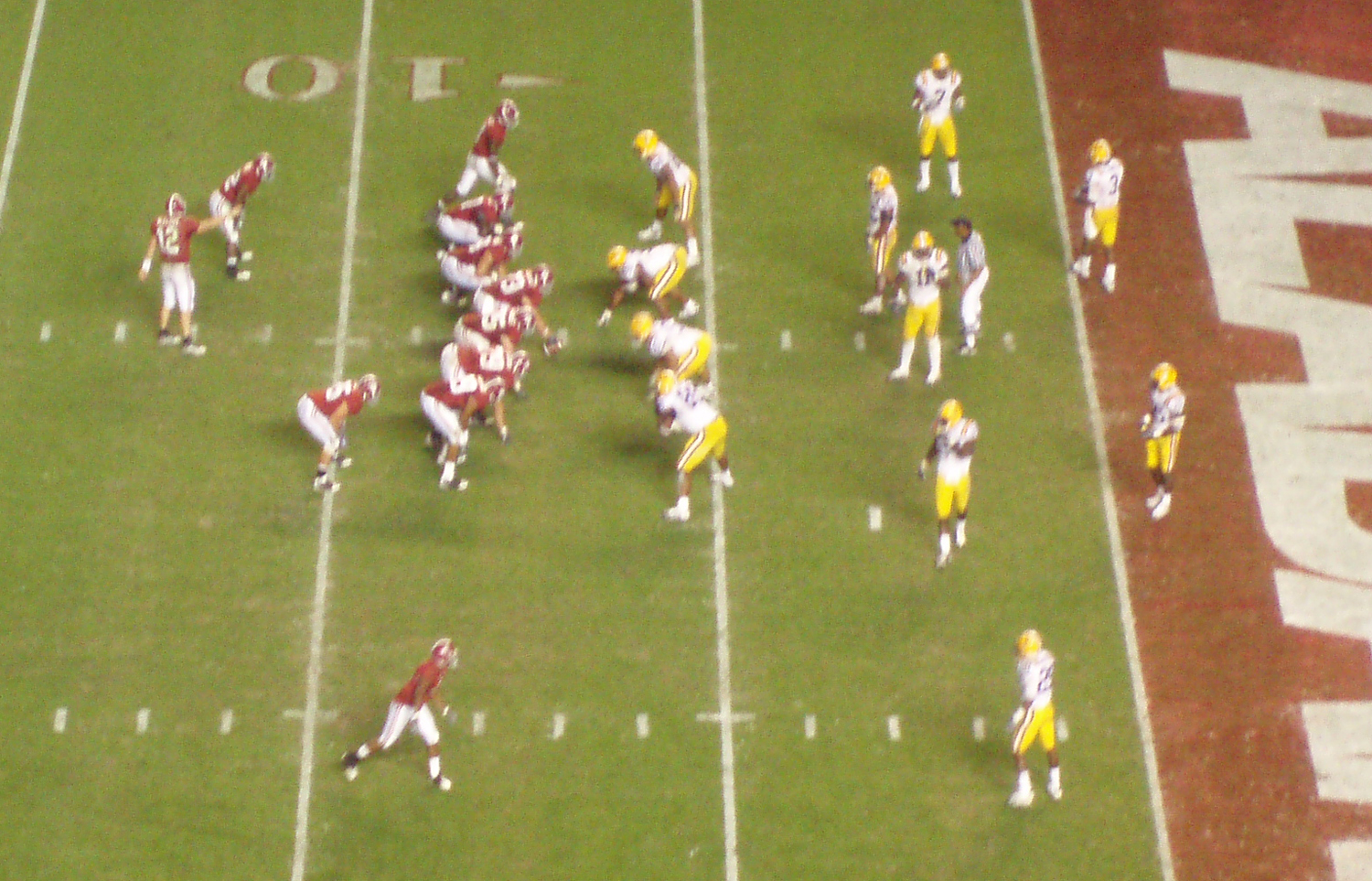 Alabama 24, LSU 15